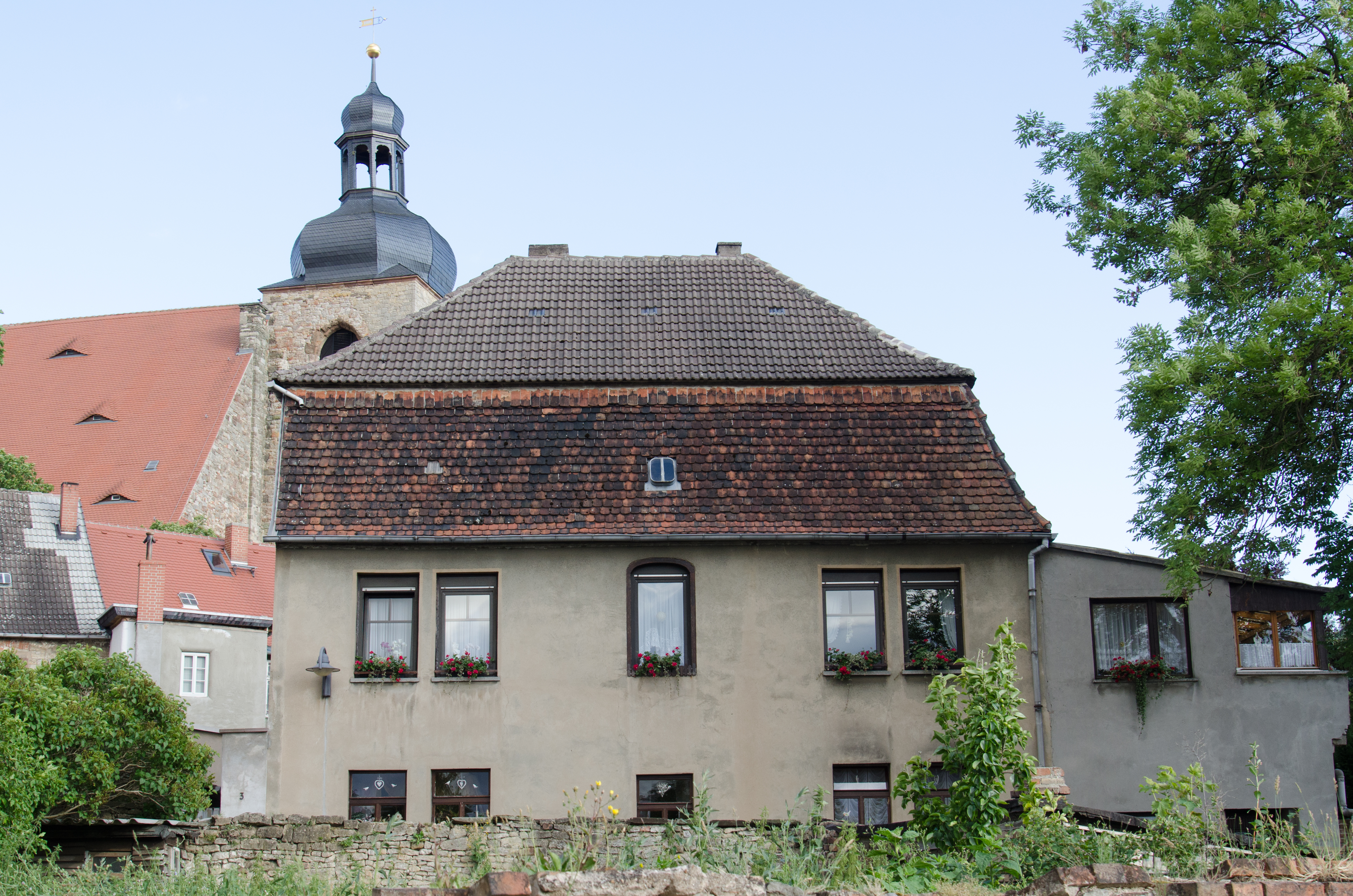 Querfurt, Burgstraße 3